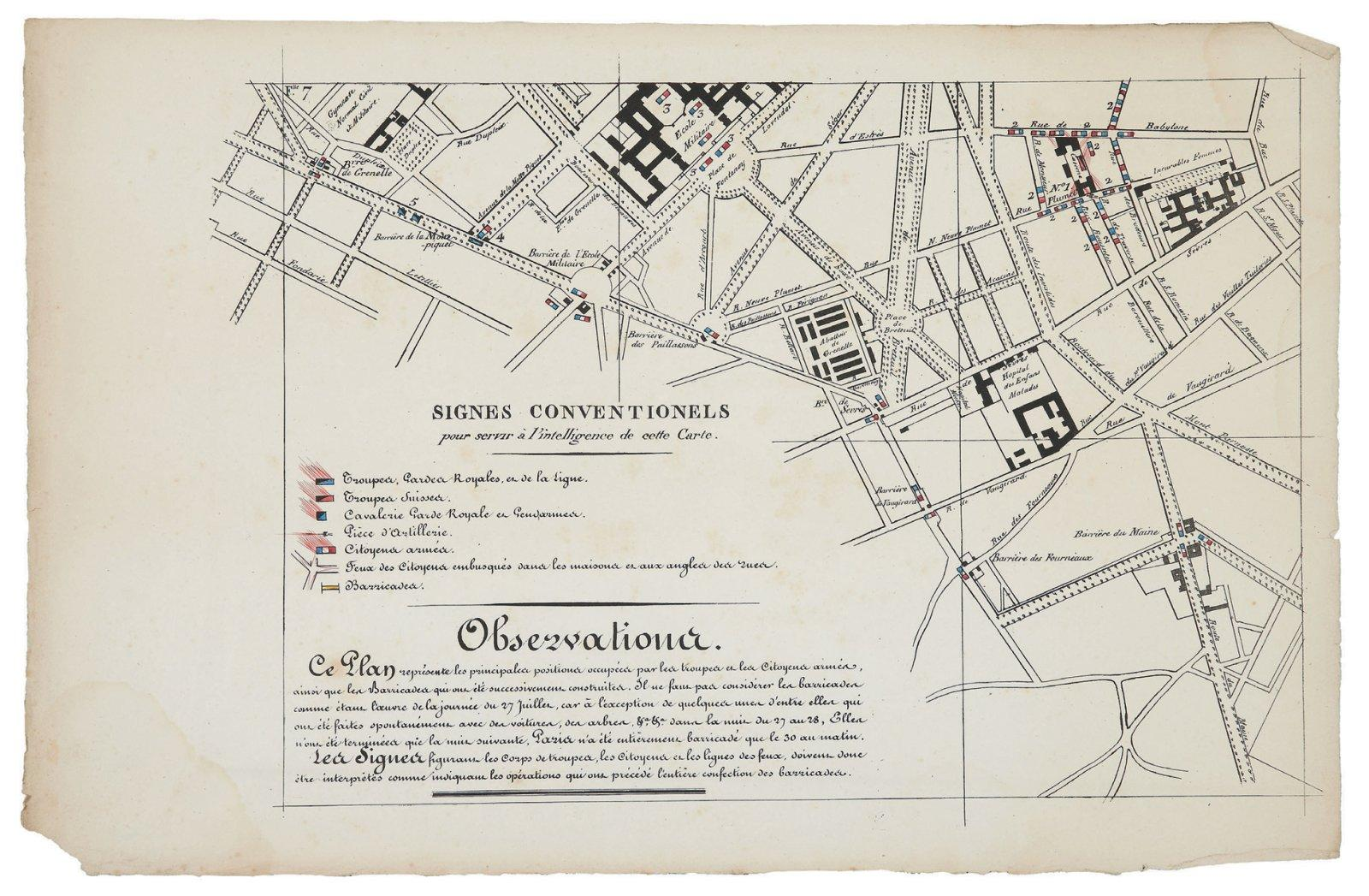 Map.